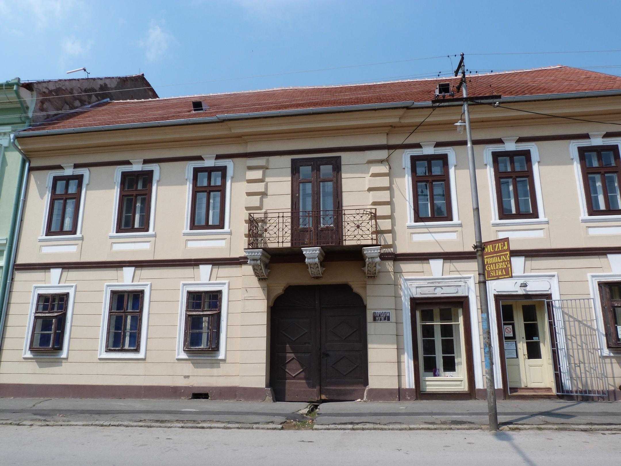 Зграда Музејске јединице у Белој Цркви